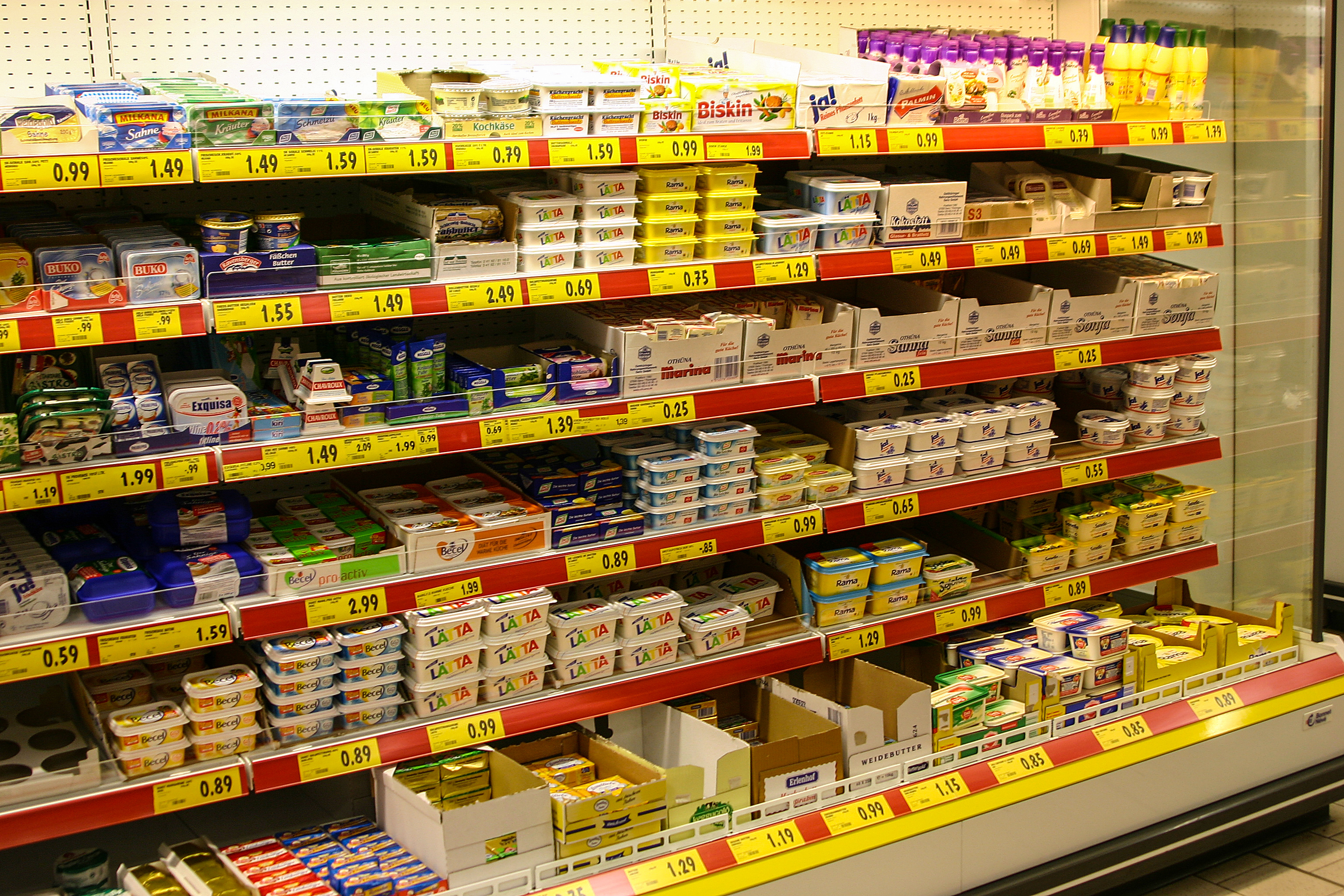 Bilder im Supermarkt REWE